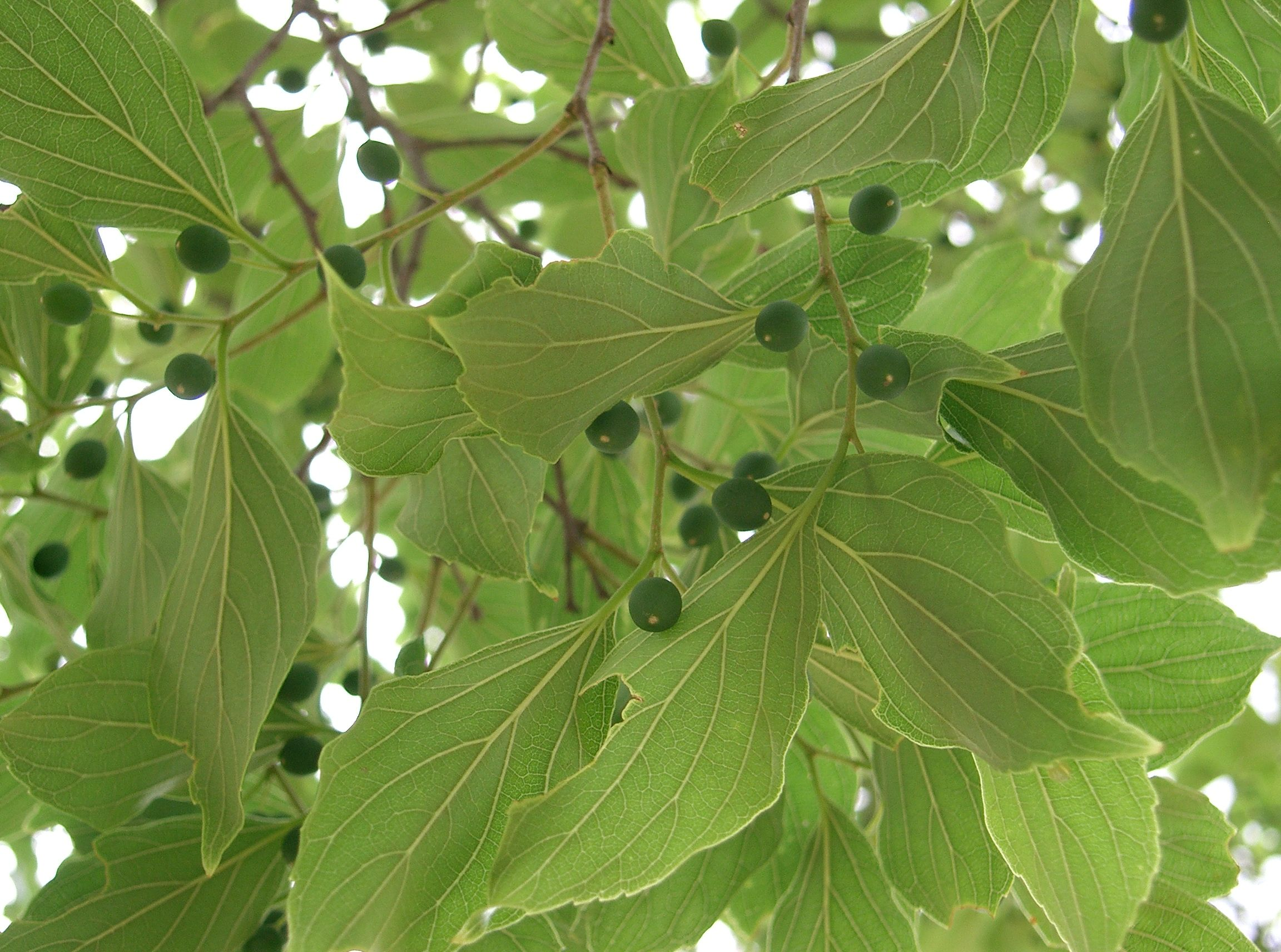 Scientific name Celtis sinensis